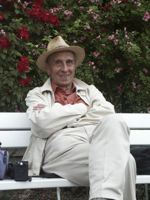 Fritz Köhlein, Gartenschriftsteller